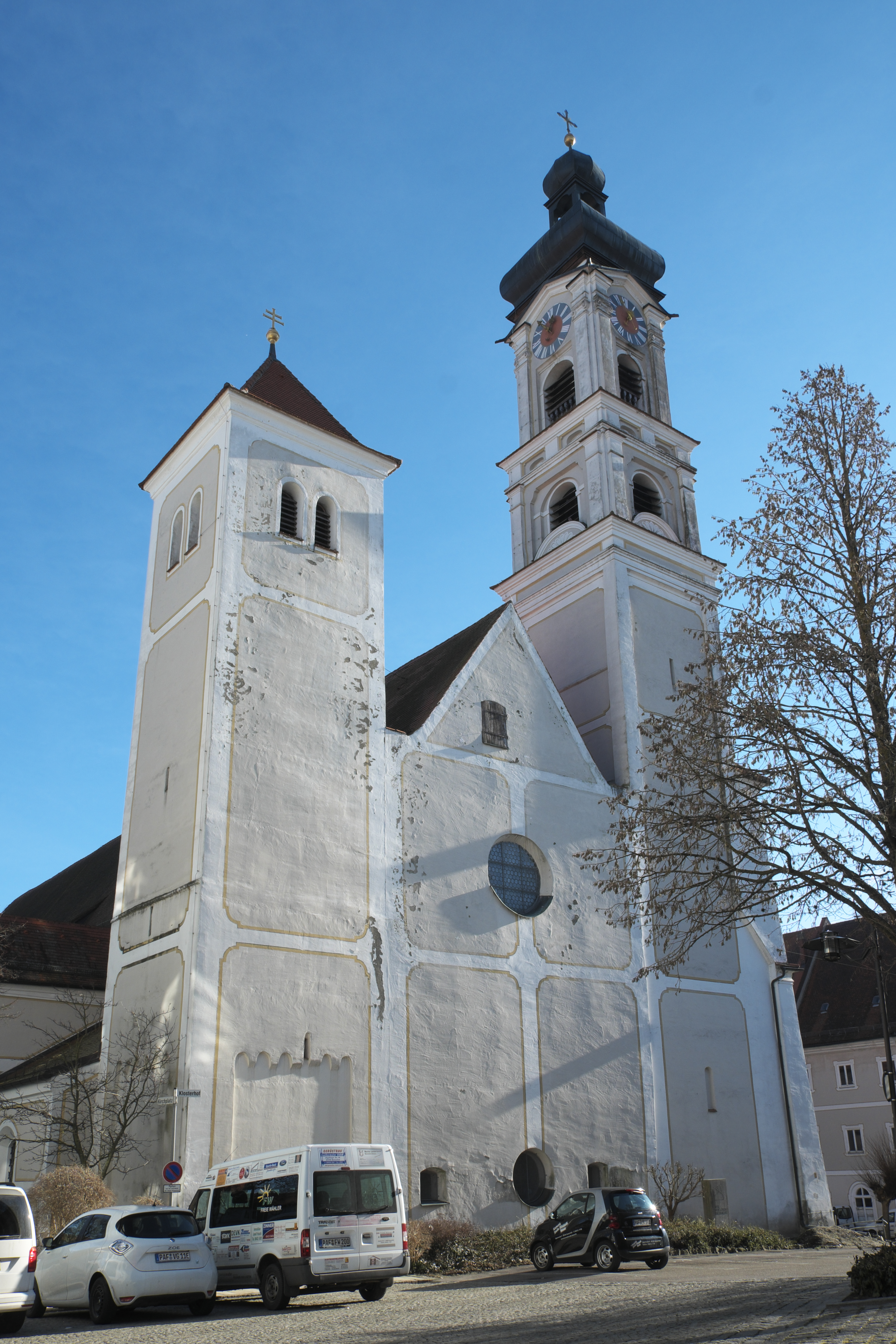 Katholische Pfarrkirche St. Emmeram, ehemalige Benediktinerinnen-Klosterkirche Mariä Himmelfahrt, in Geisenfeld im Landkreis Pfaffenhofen an der Ilm (Bayern/Deutschland)